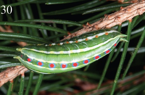 Parasa pygmy